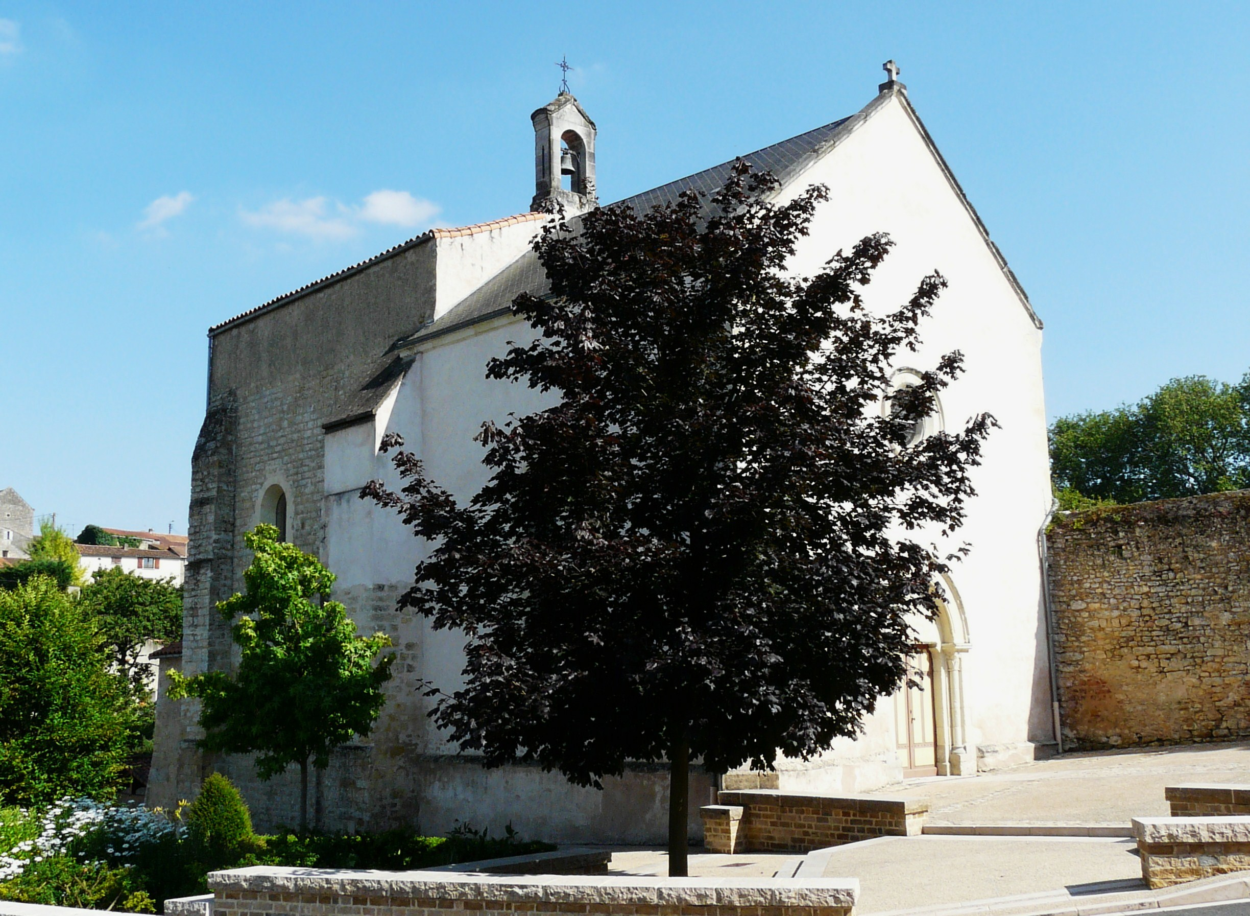 L'église de Saint-Jean-de-Thouars